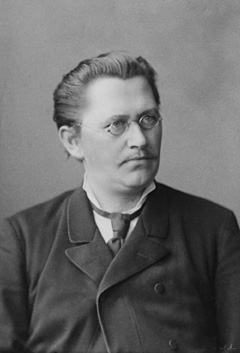 Professor Erich Harnack (1852-1915)